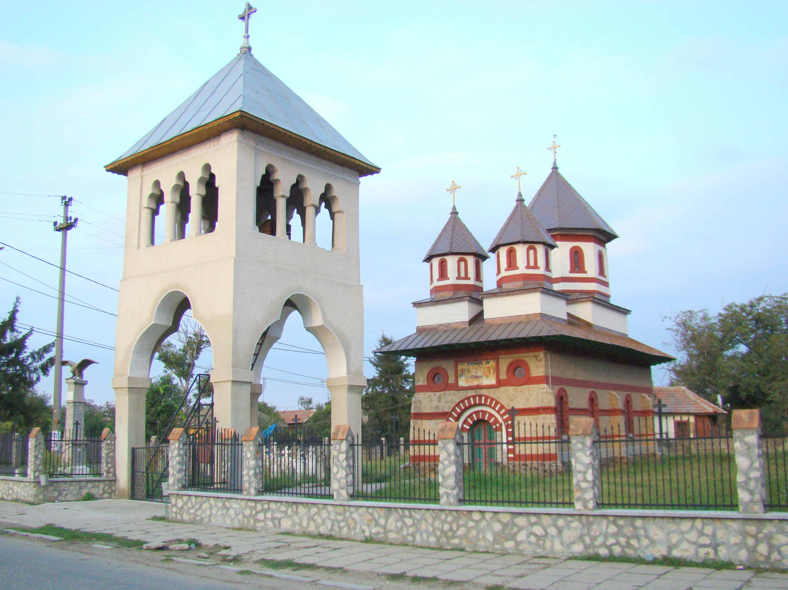 Biserica ortodoxă din Gruia, județul Mehedinți